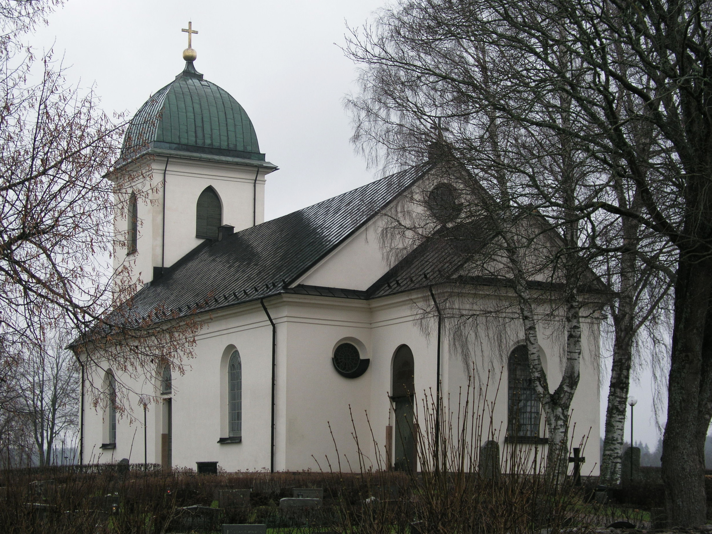 Ljungs kyrka, Östergötland, Diocese of Linköping